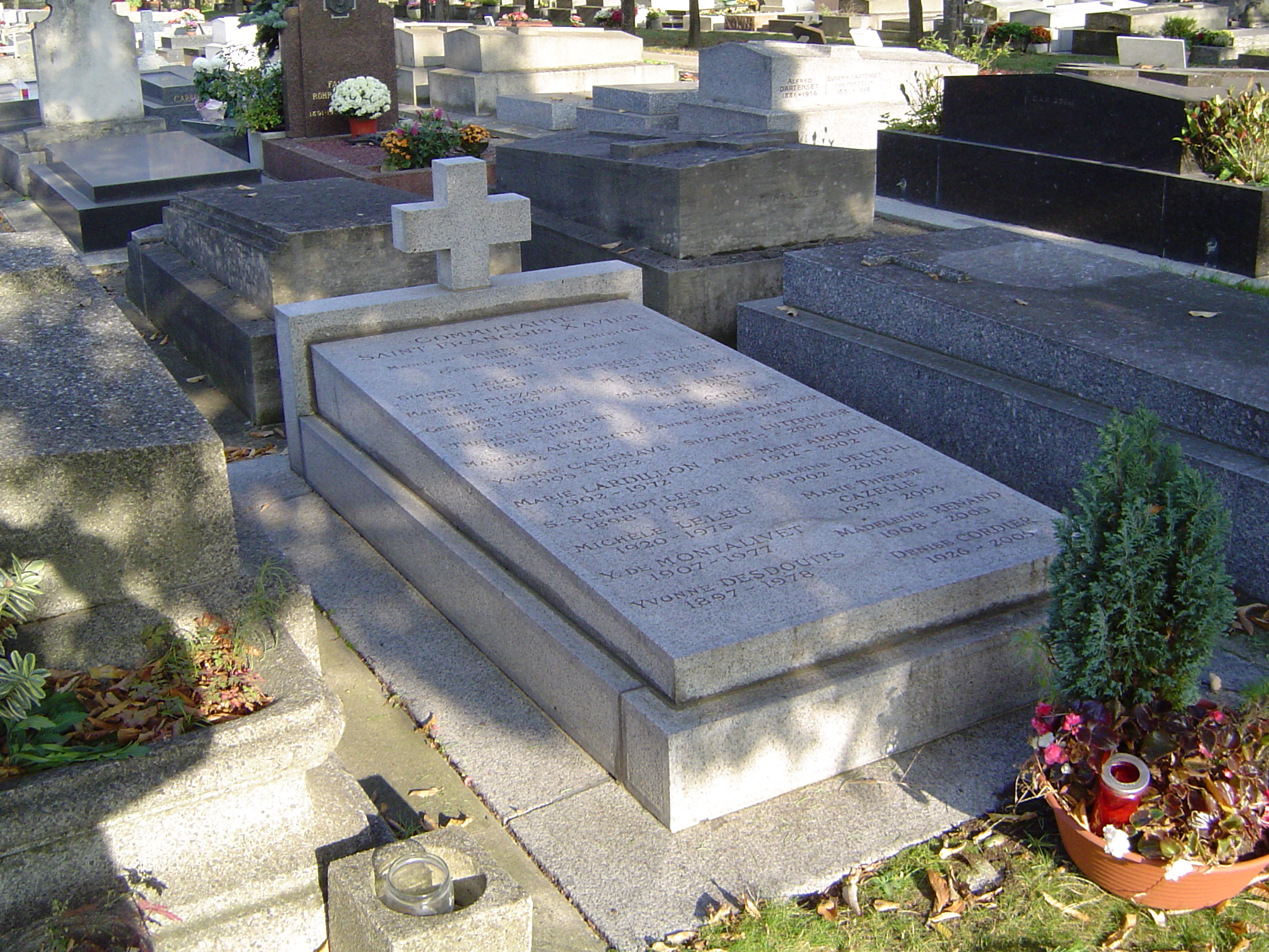 Sépulture de la communauté Saint-François Xavier